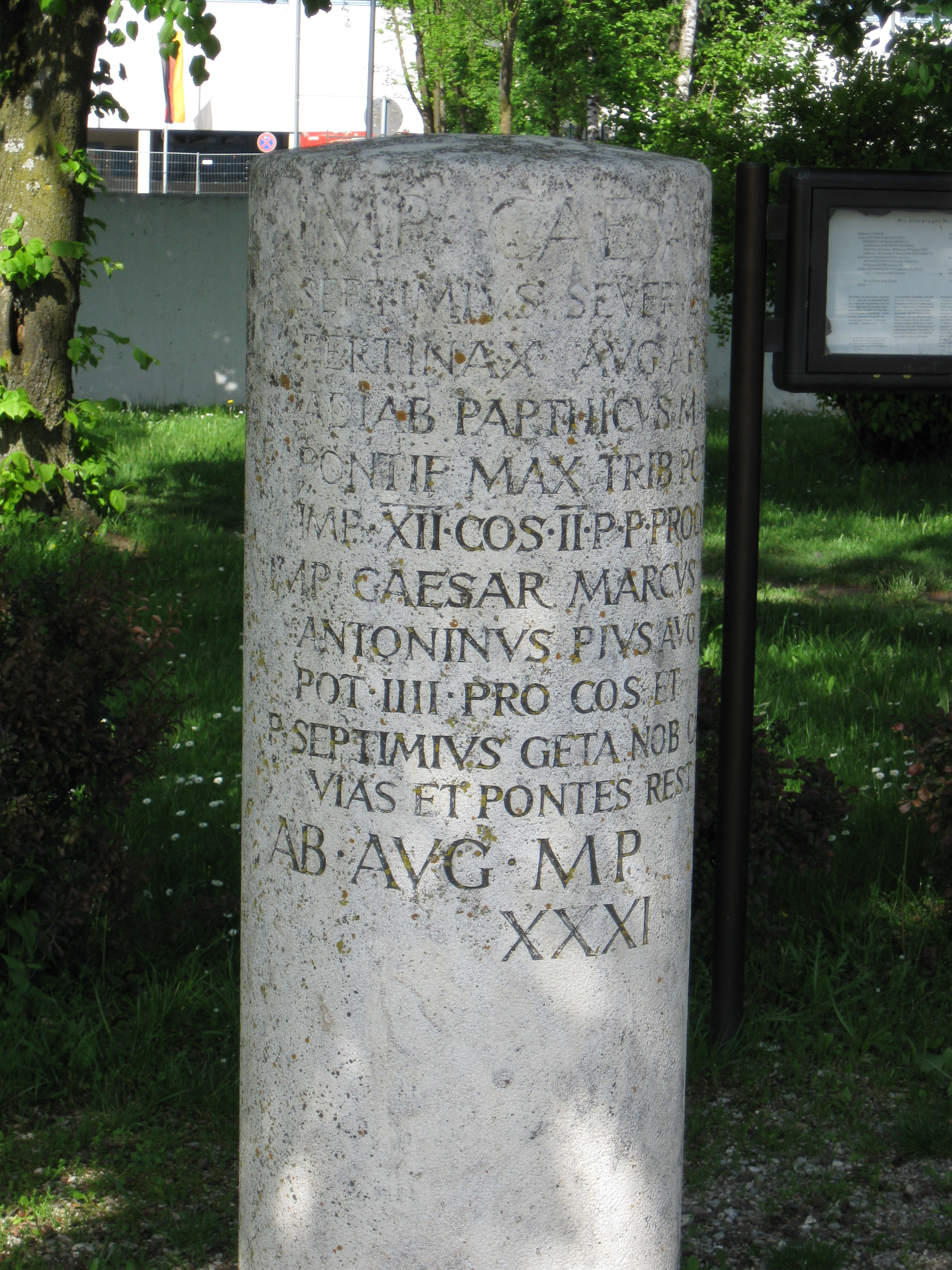 Römersäule in Gilching, Bayern.(Kopie, wiederaufgestellt) XXXI ist im Original XXXXI